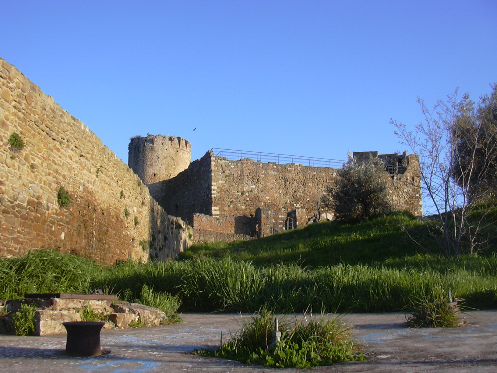 Scarlino Castle, Tuscany/Italy La rocca aldobrandesca di Scarlino.